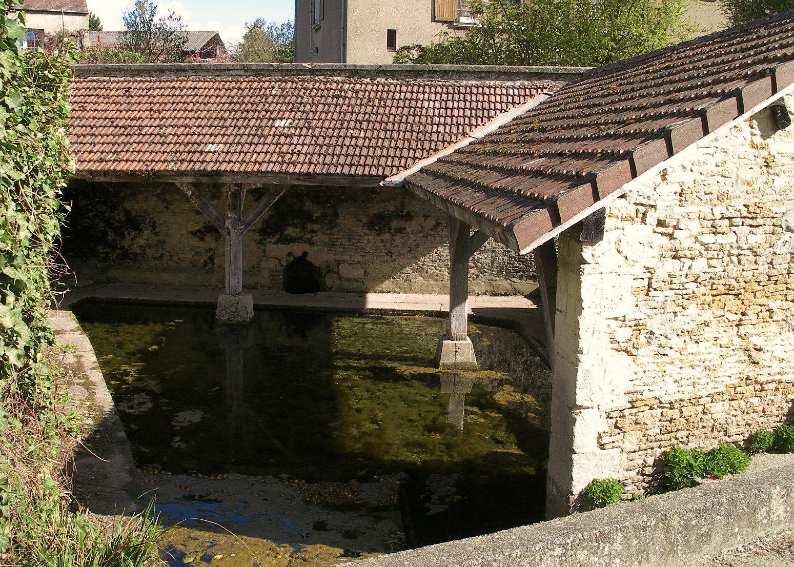 La voir de Giberville sur la Gronde (Calvados)